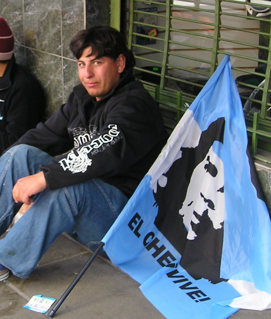 Manifestación. Bandera con imagen del Che Guevara. Argentina.